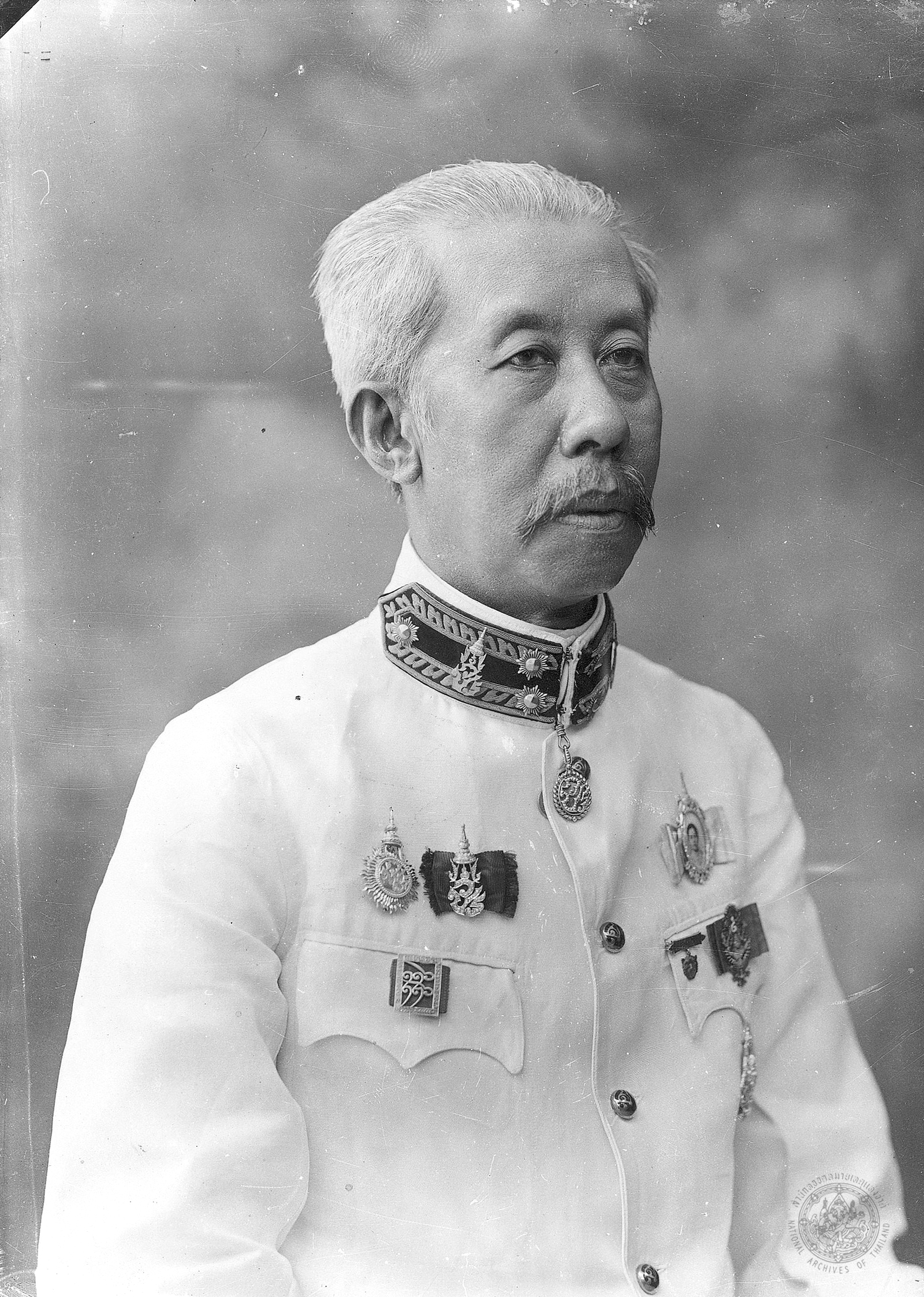 มหาเสวกเอก พระเจ้าบรมวงศ์เธอ พระองค์เจ้ากฤษดาภินิหาร กรมพระนเรศร์วรฤทธิ์ทรงเครื่องแบบปกติ ทรงแผงคอบอกชั้นยศ